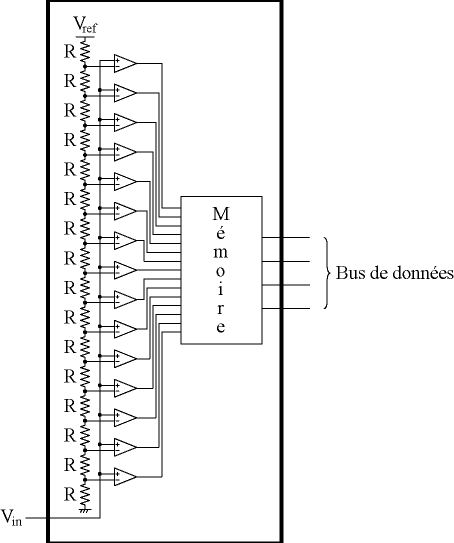 auteur : haarkon image originale non publiée